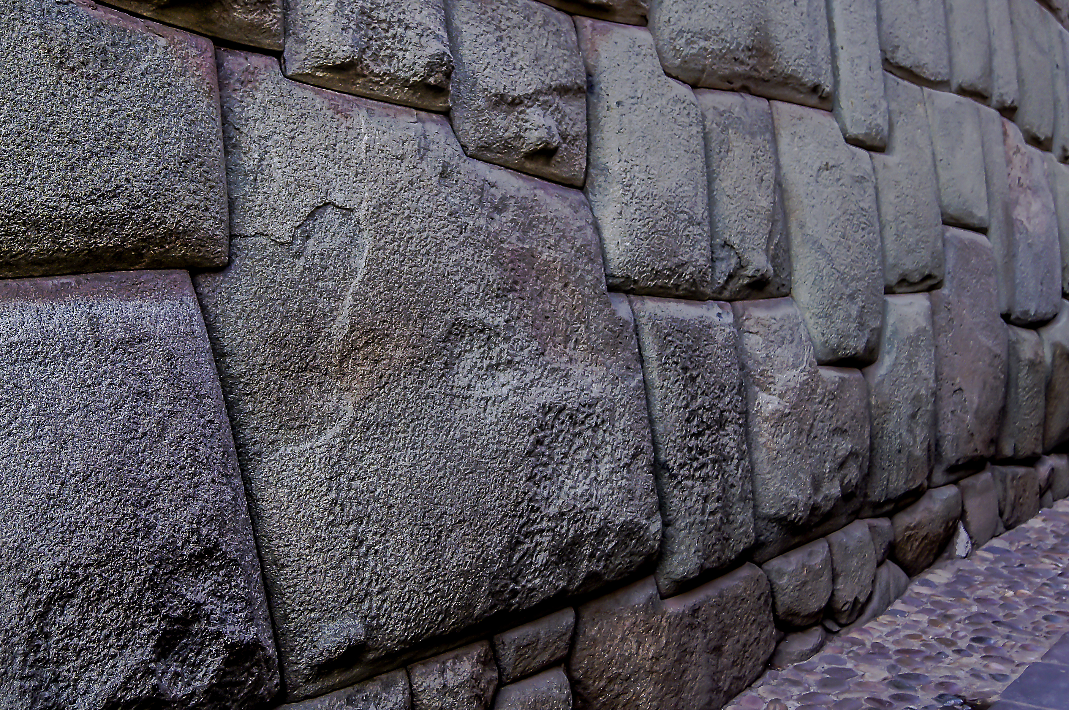 La piedra de los doce ángulos, en calle Hatun Rumiyoc, Cuzco